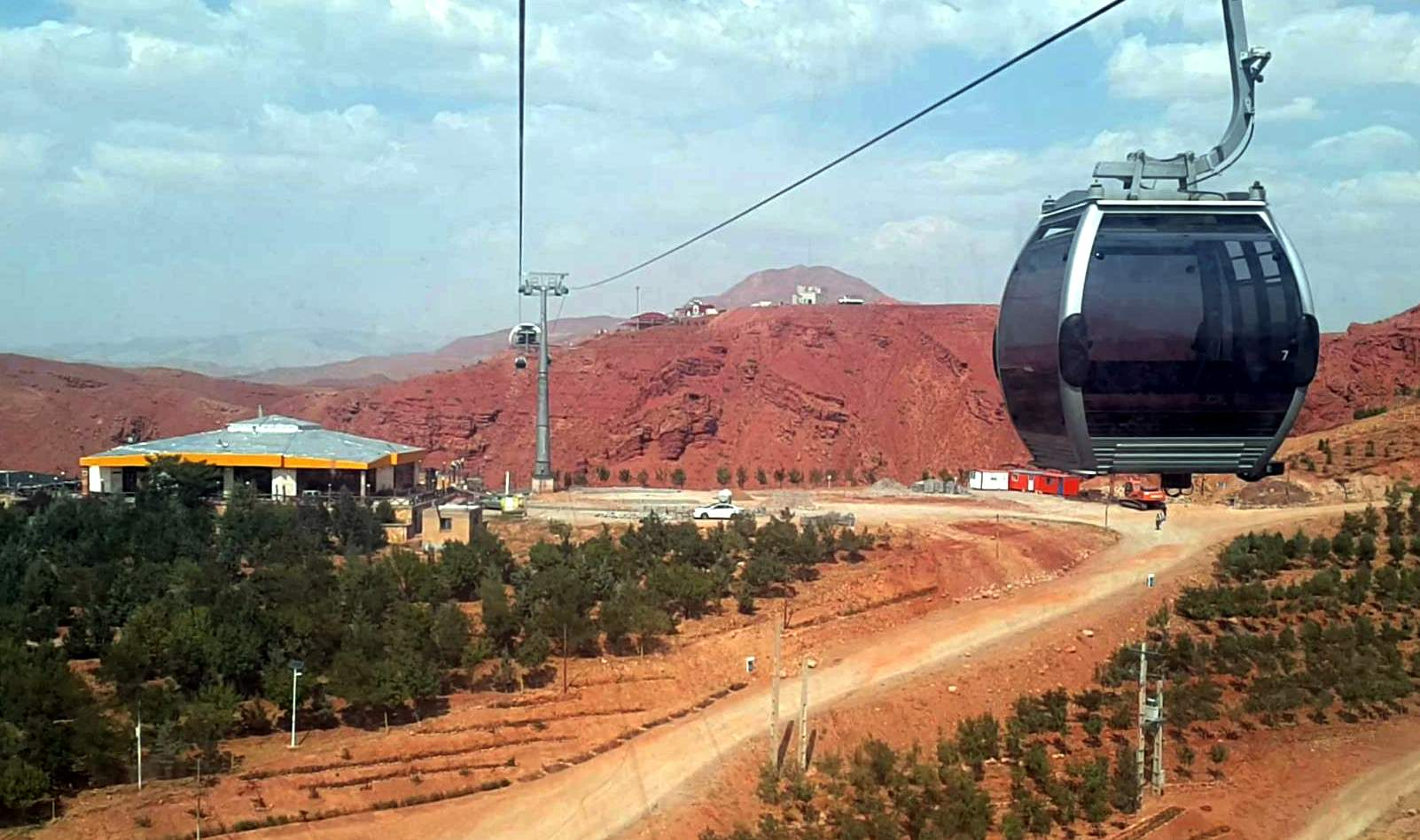 تله کابین کوه عون ابن علی